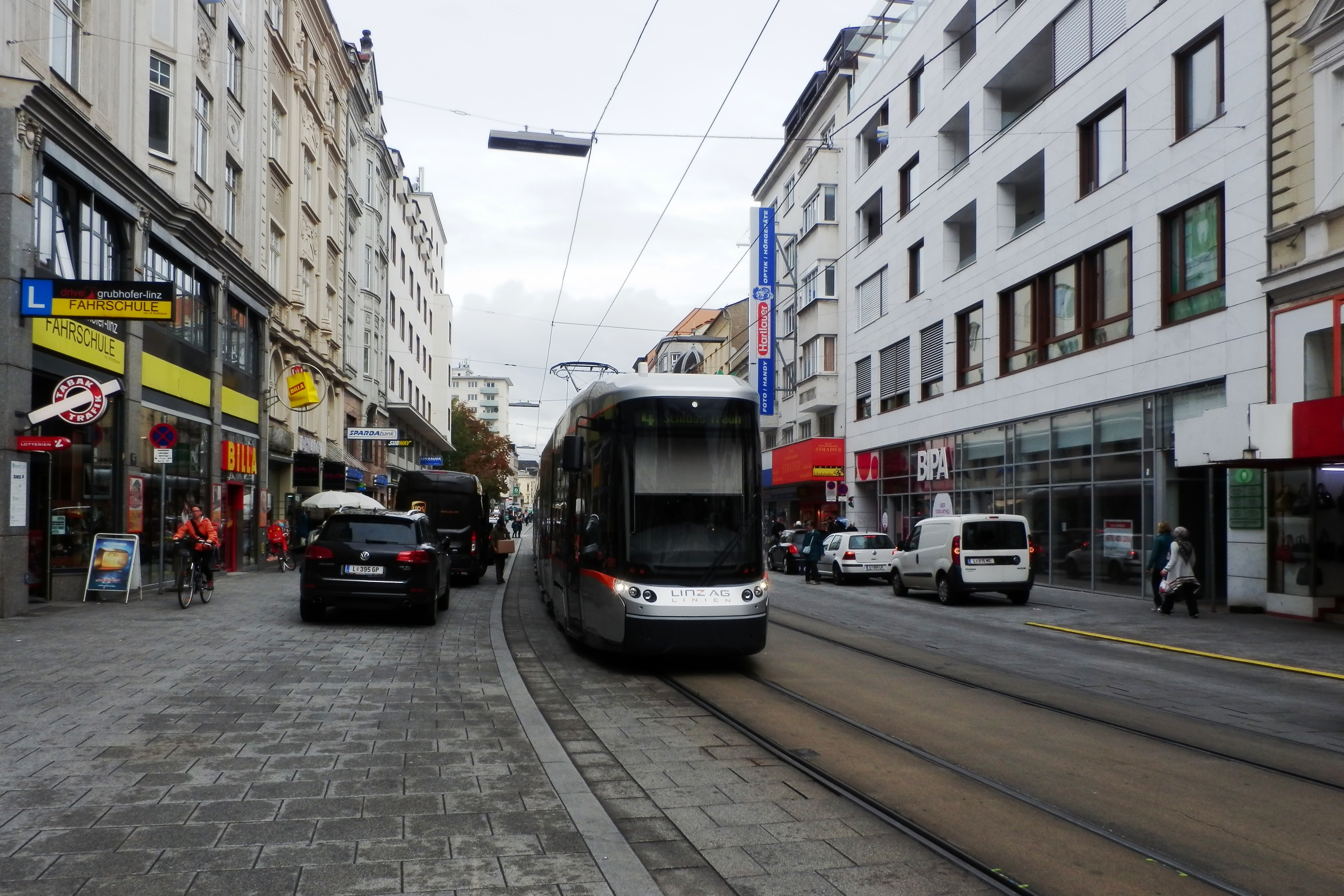 Linz AG Linien Straßenbahn Linie 4 Richtung Schloss Traun, in der Landstraße bei der Goethekreuzung